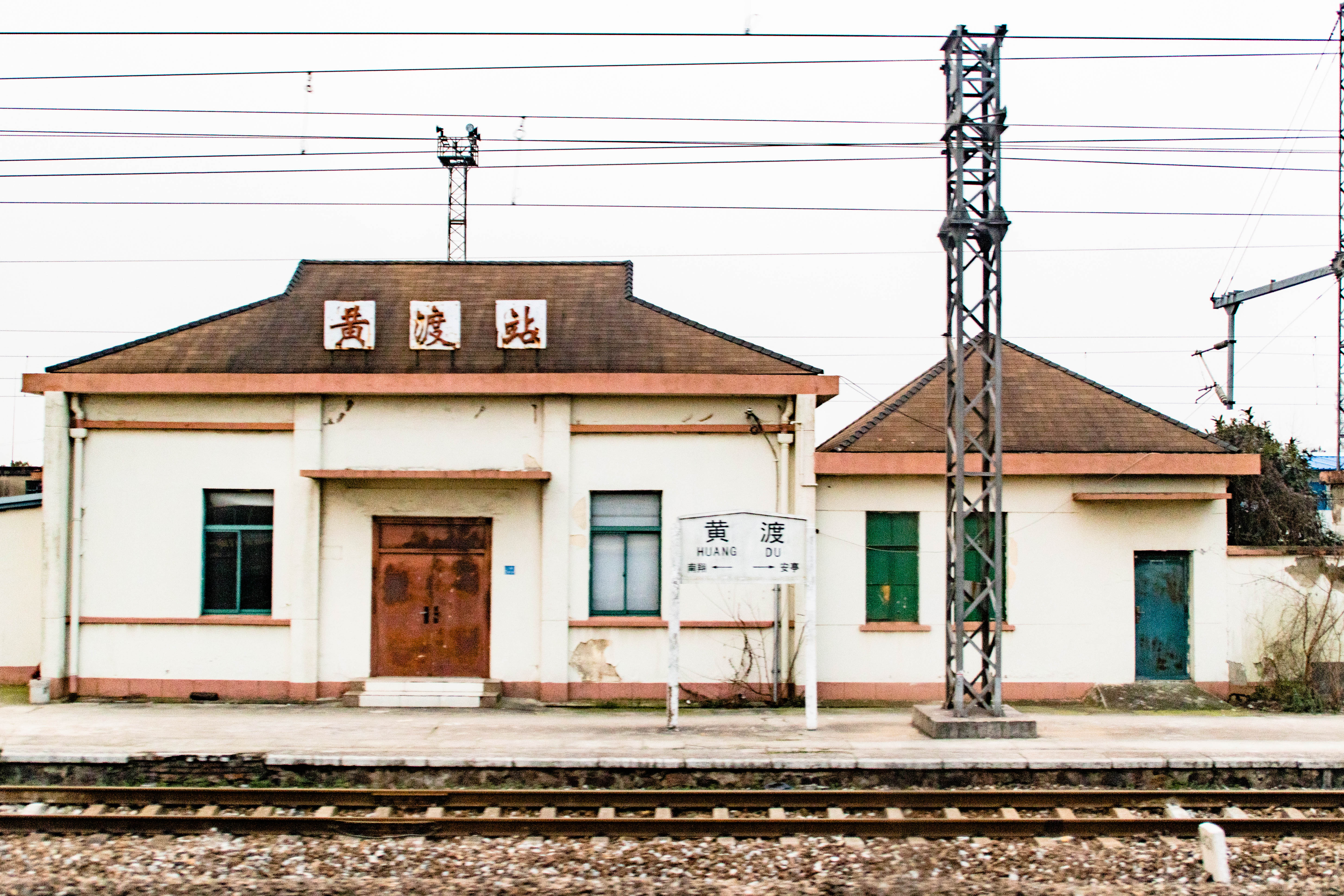 中文（中国大陆）: 黄渡站站房